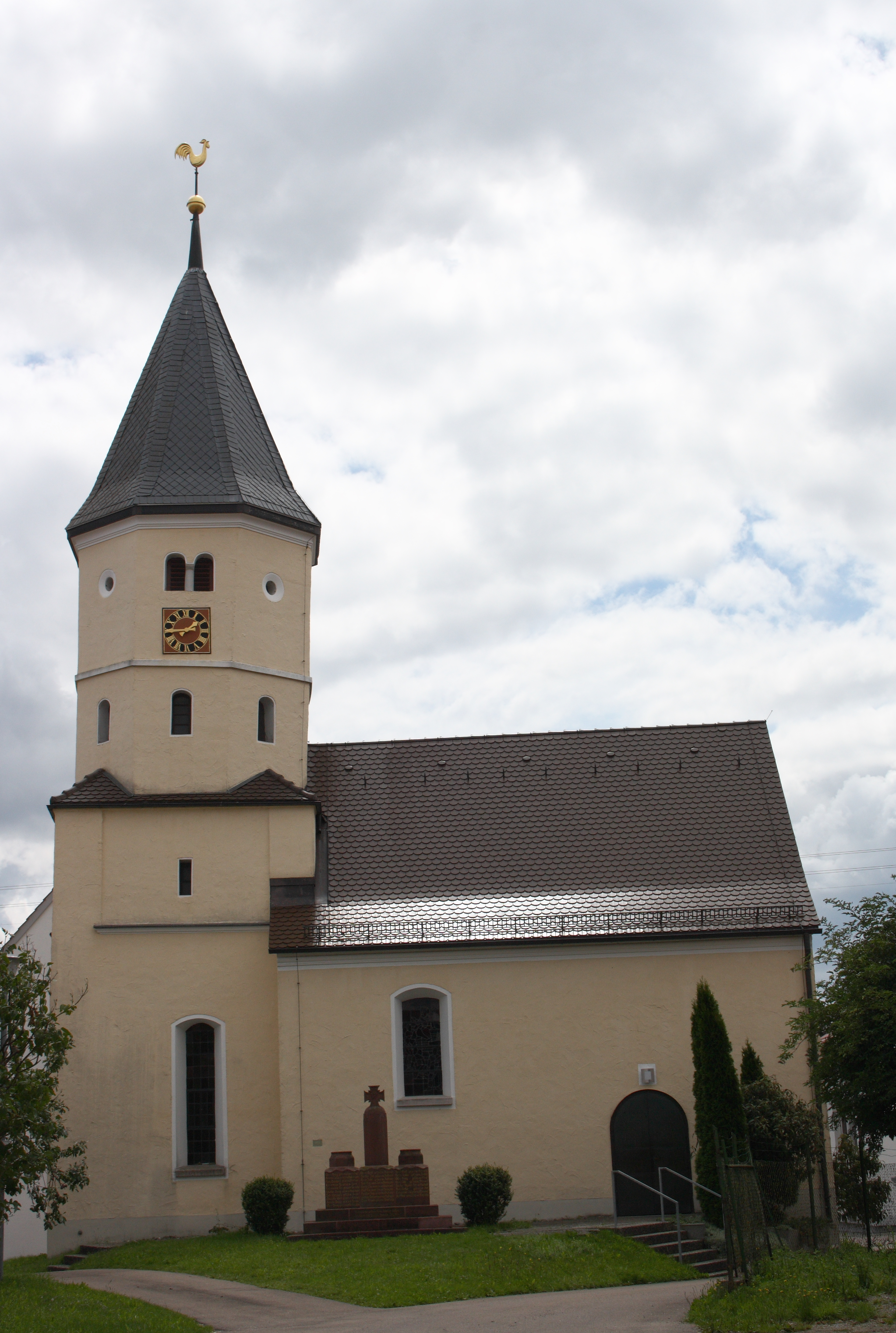 Evangelische Kirche in Sachsenhausen, einem Stadtteil von Giengen an der Brenz im Landkreis Heidenheim (Baden-Württemberg), 1681 erbaut